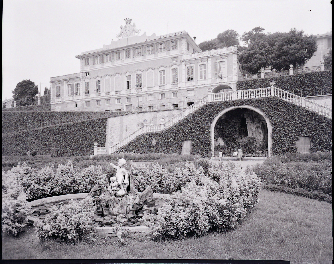 Genova Voltri, villa Duchessa di Galliera. Servizio fotografico : Genova, 1964 / Paolo Monti. - Buste: 11, Fototipi: 11 : Negativo b/n, gelatina bromuro d'argento/ pellicola ; 10x12. - ((Serie costituita da 11 buste sciolte di negativi identificati con i nn.: 8347, 8348, 8349, 8350, 8351, 8352, 8353, 8354, 8355, 8356, 8357. - Il negativo identificato con il numero 46397 è stato realizzato per Zodiac. - Occasione: Documentazione per la pubblicazione: Italia Nostra (a cura di), "Le ville genovesi", catalogo della mostra, Genova 1962, Genova, Comune di Genova, 1967. - Fonte: Monografia di Italia Nostra (a cura di): Le ville genovesi, catalogo della mostra, Genova 1962, Genova, Comune di Genova (1967). - Fonte: Lettera di Paolo Monti: I. Carteggi/ Genova - Enrico (1963-1966), presso Archivio Paolo Monti. Camicia con documenti dattiloscritti e manoscritti vari relativi al lavoro eseguito per Italia Nostra: preventivi, lettere, inventari. - Fonte: Agenda di Paolo Monti: Monti/ 2/ 6 giugno 1964 - 31 marzo 1966/ 8194-12420 (1964-1966), presso Archivio Paolo Monti